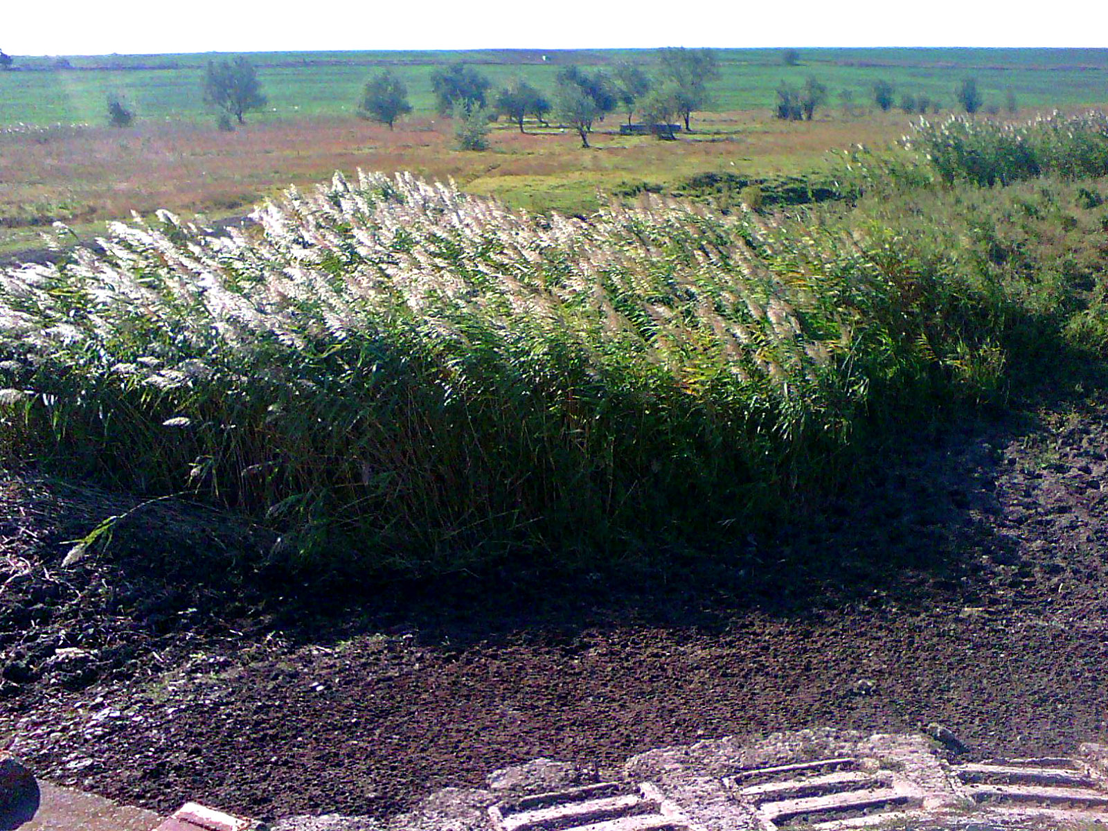 Річка Ташбунар в Ізмаїльському районі Одеської області